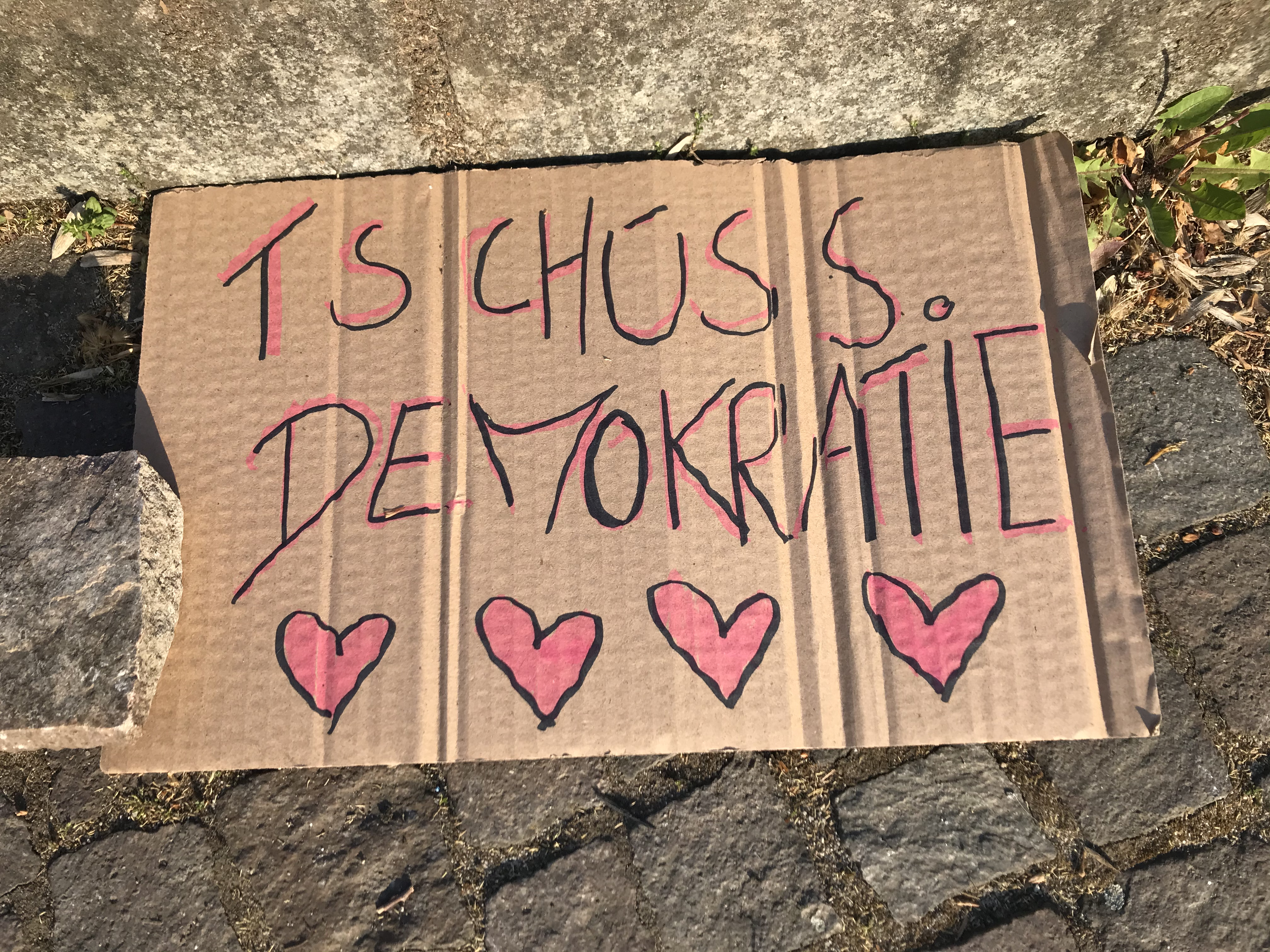 Schild mit Aufschrift "Tschüss Demokratie". Gesehen nach einer Demo für die Grundrechte anlässlich der staatlichen Maßnahmen bezüglich Corona.